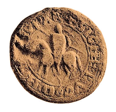 Segell del comte Ponç Hug IV (Ponç V) d'Empúries (1277-1313)